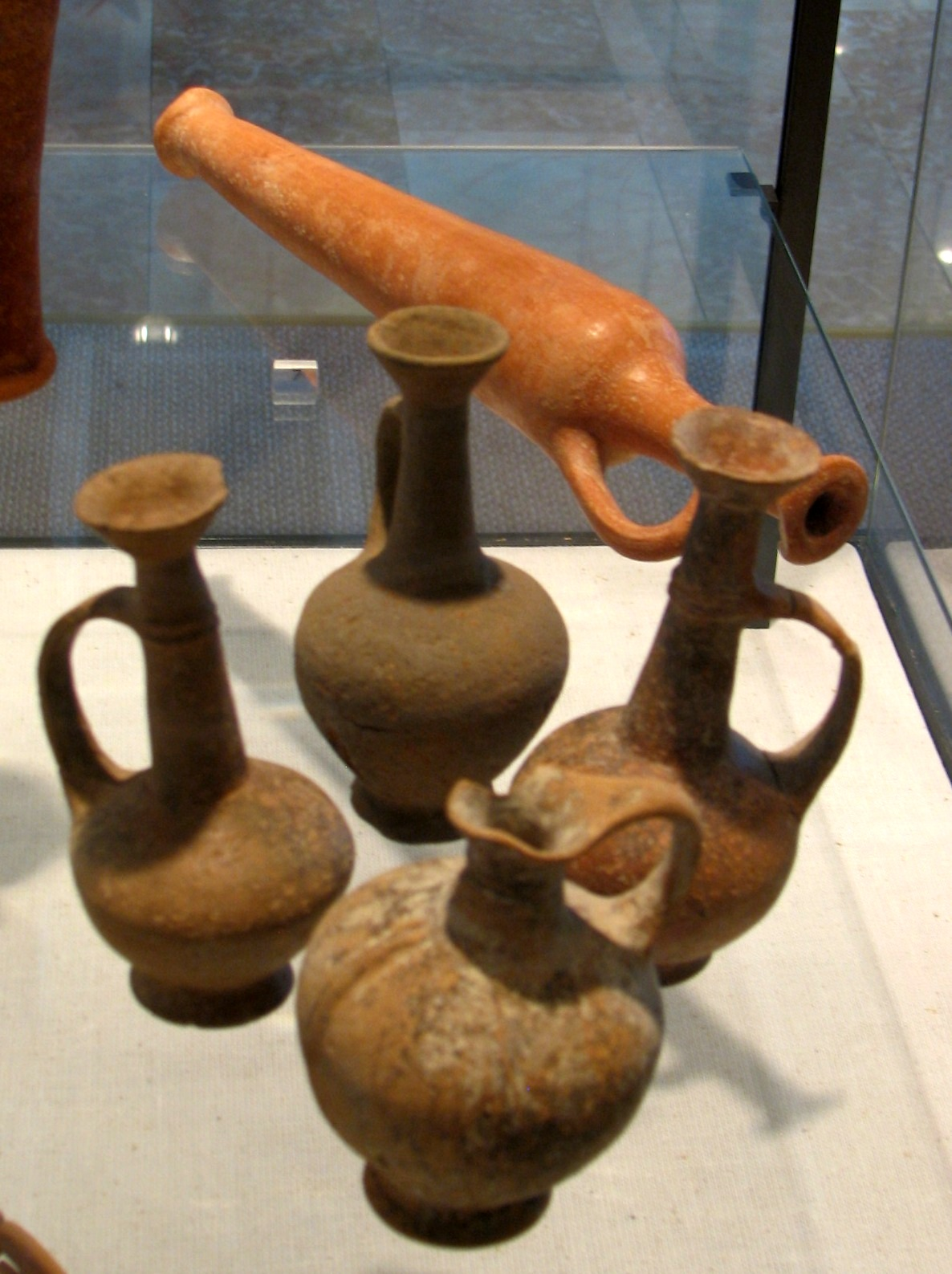 Late Bronze Period Pottery in Hecht Museum - Base Ring Ware כלים מתקופת הברונזה המאוחרת במוזיאון הכט באוניברסיטת חיפה בחזית פכיות "בילביל" קטנות מחופות שחור מעוטרות בפסים לבנים ממשפחת כלי בסיס טבעת יבוא קיפרי. מאחור בקבוק סורי - כלי שמקורו בצפון סוריה בקבוק צר וגבוה שגופו מחופה חיפוי אדום והוא ממורק היטב. הופיע לראשונה בתקופת ברונזה מאוחרת ב 1400-1300 לפני הספירה